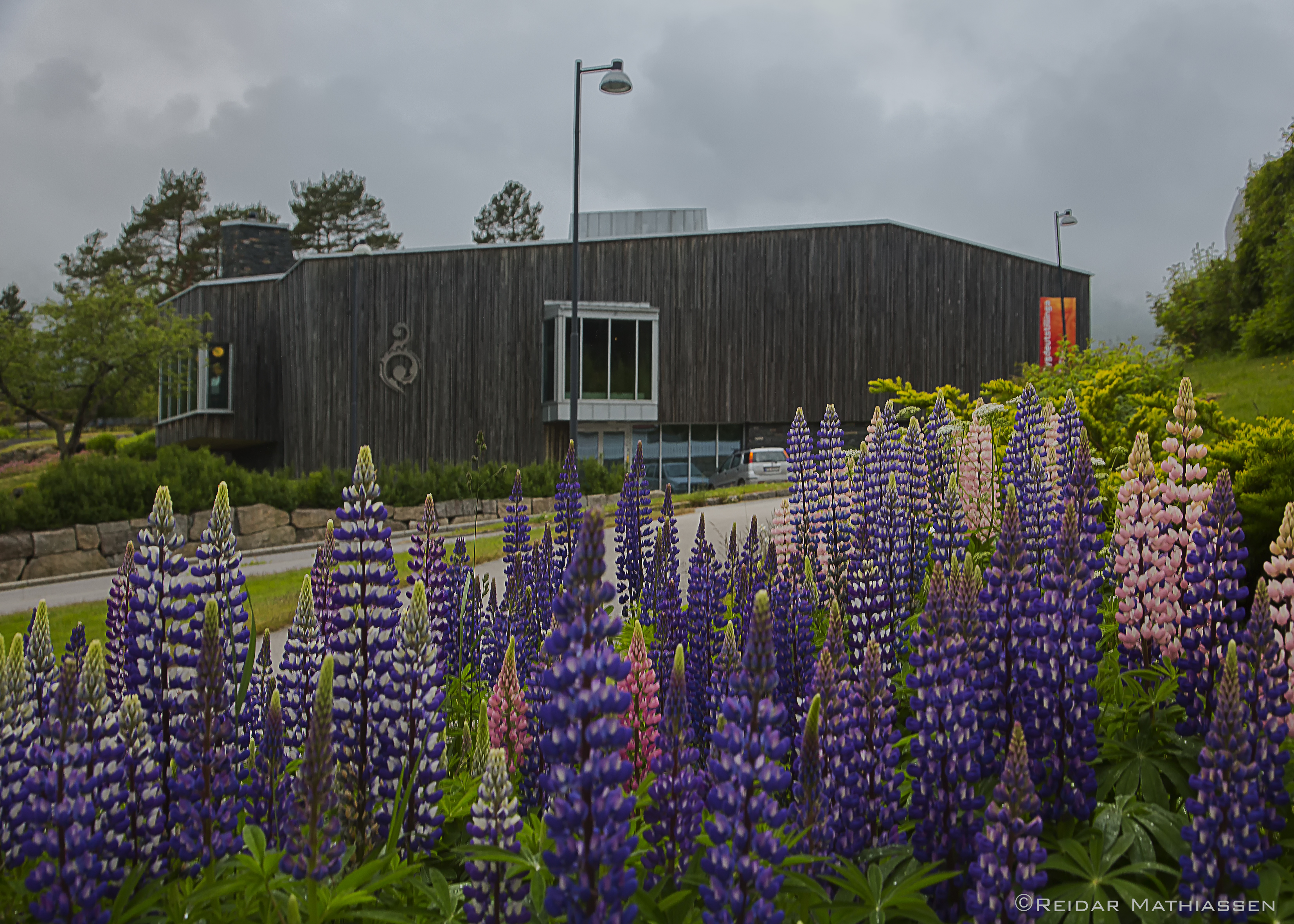 Minne kultursenter i Åseral